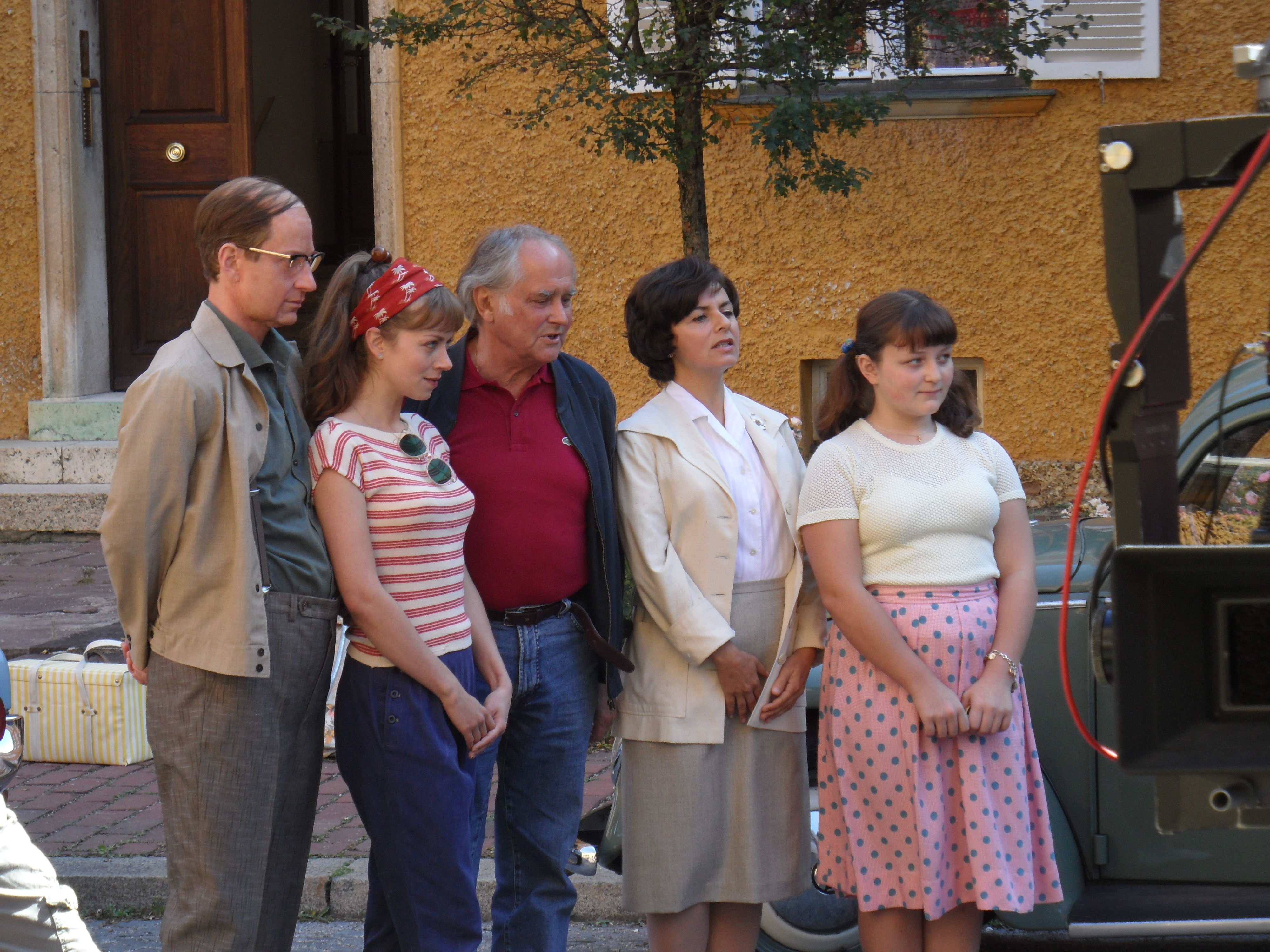 Schauspieler und Regisseur des Fernsehfilms Let’s go!: Maxim Mehmet, Alice Dwyer, Michael Verhoeven, Naomi Krauss und Deborah Kios